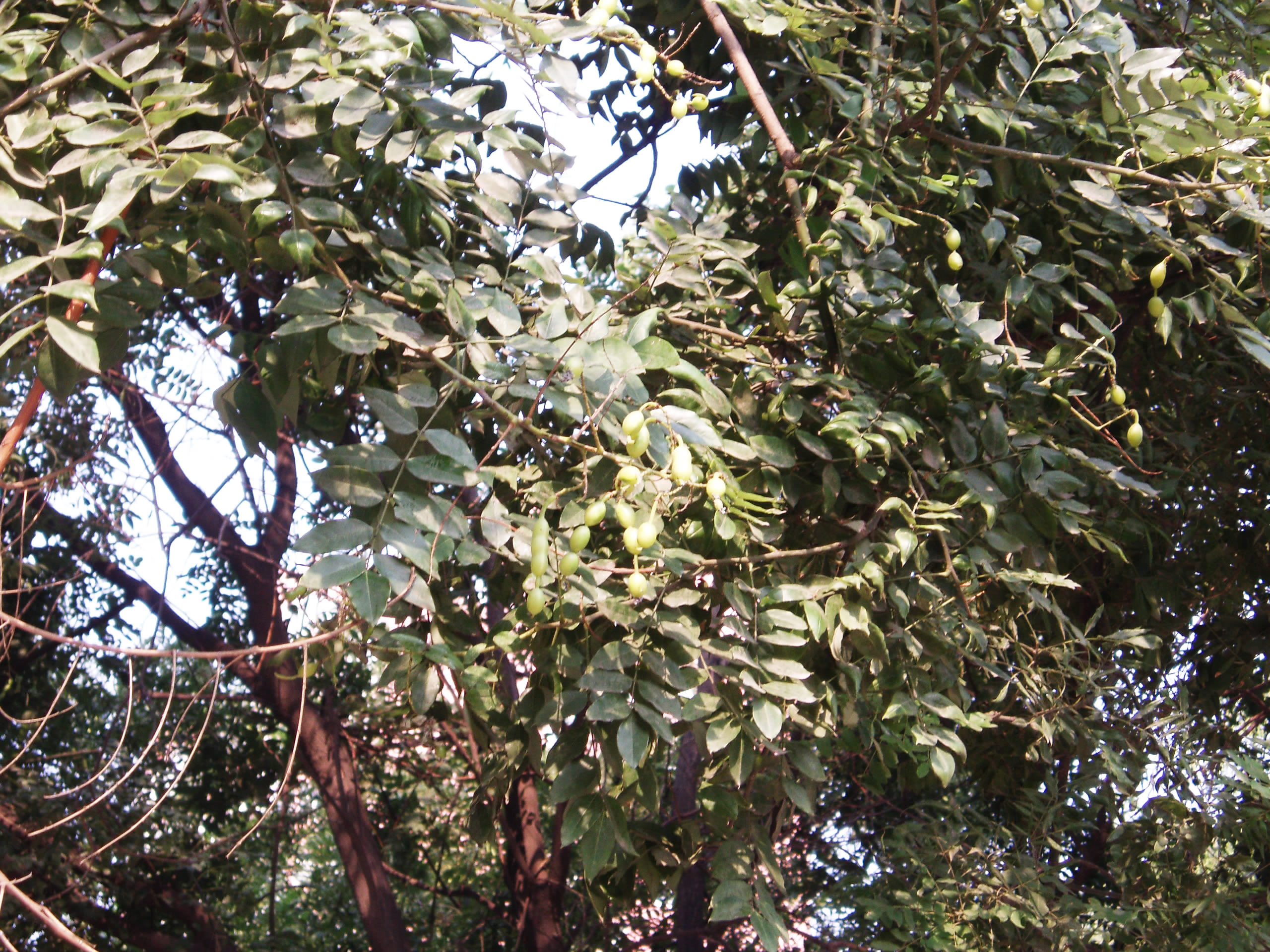 Pagoda tree seeds